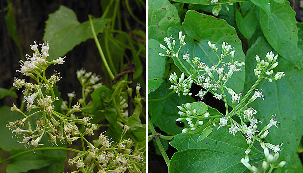 Mikania micrantha